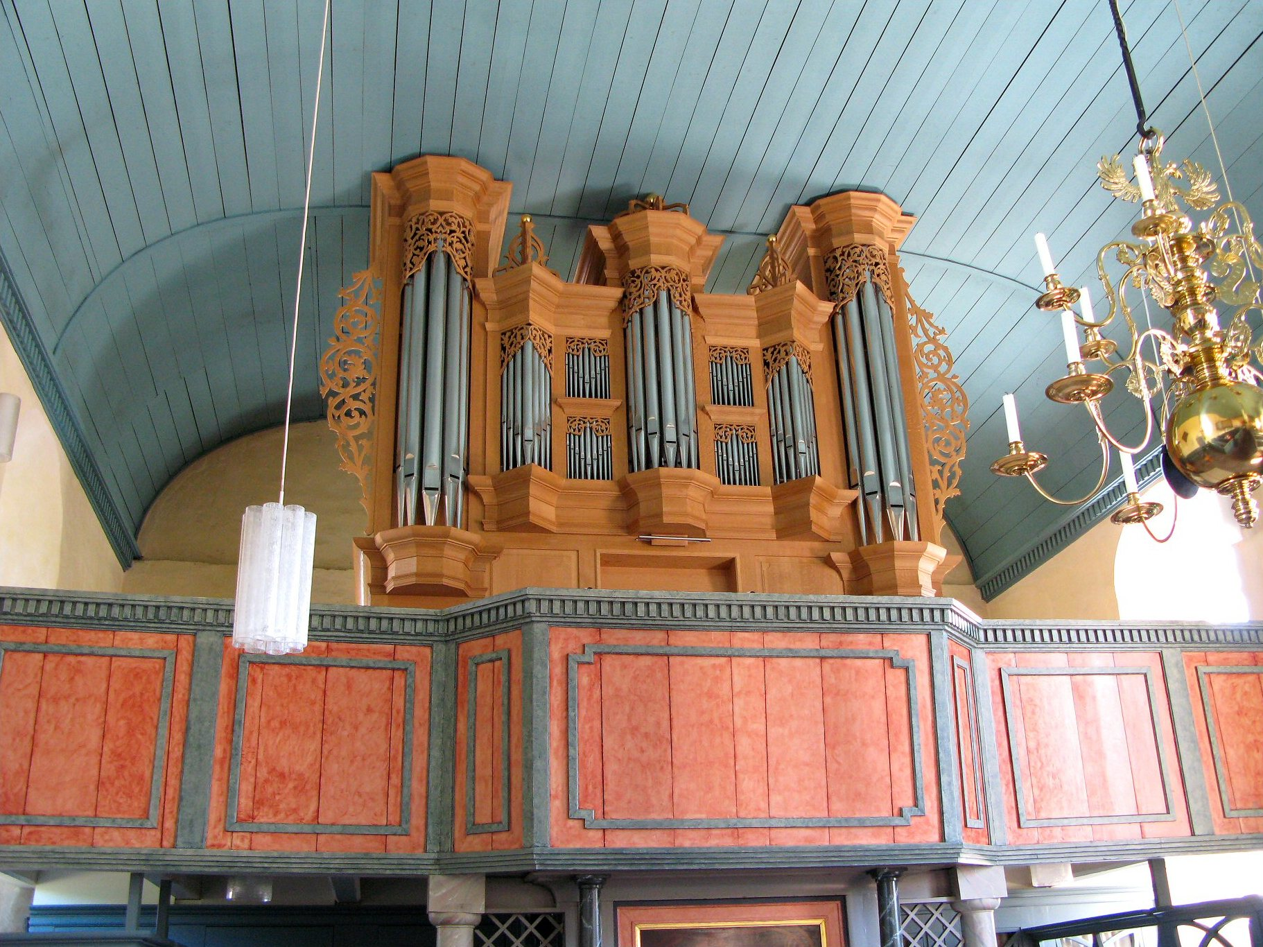 Orgel in Logabirum, Landkreis Leer